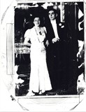 Ubaldo Ragona con sua moglie.